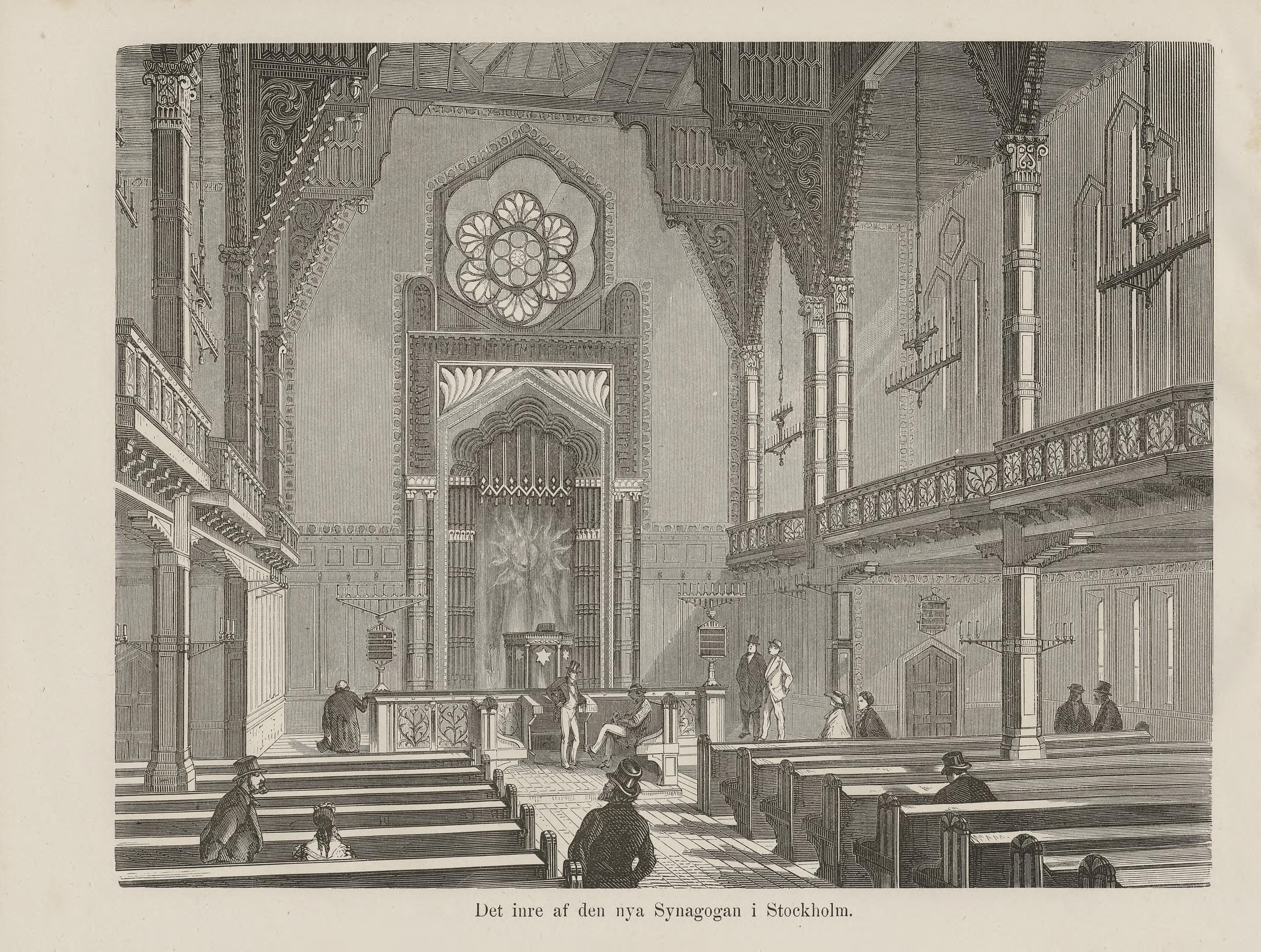 Illustrasjon hentet fra boken Nordiska taflor av ukjent forfatter og utgitt av Albert Bonnier (se, 1873)